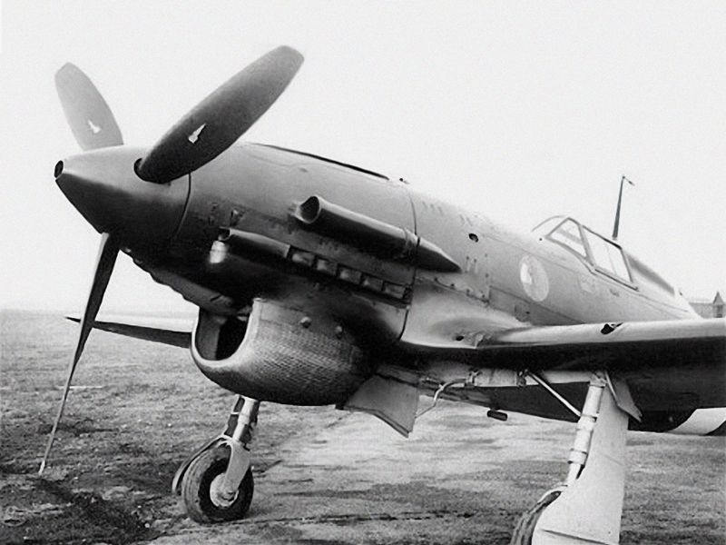 Macchi_M.C.202_Folgore_prototype